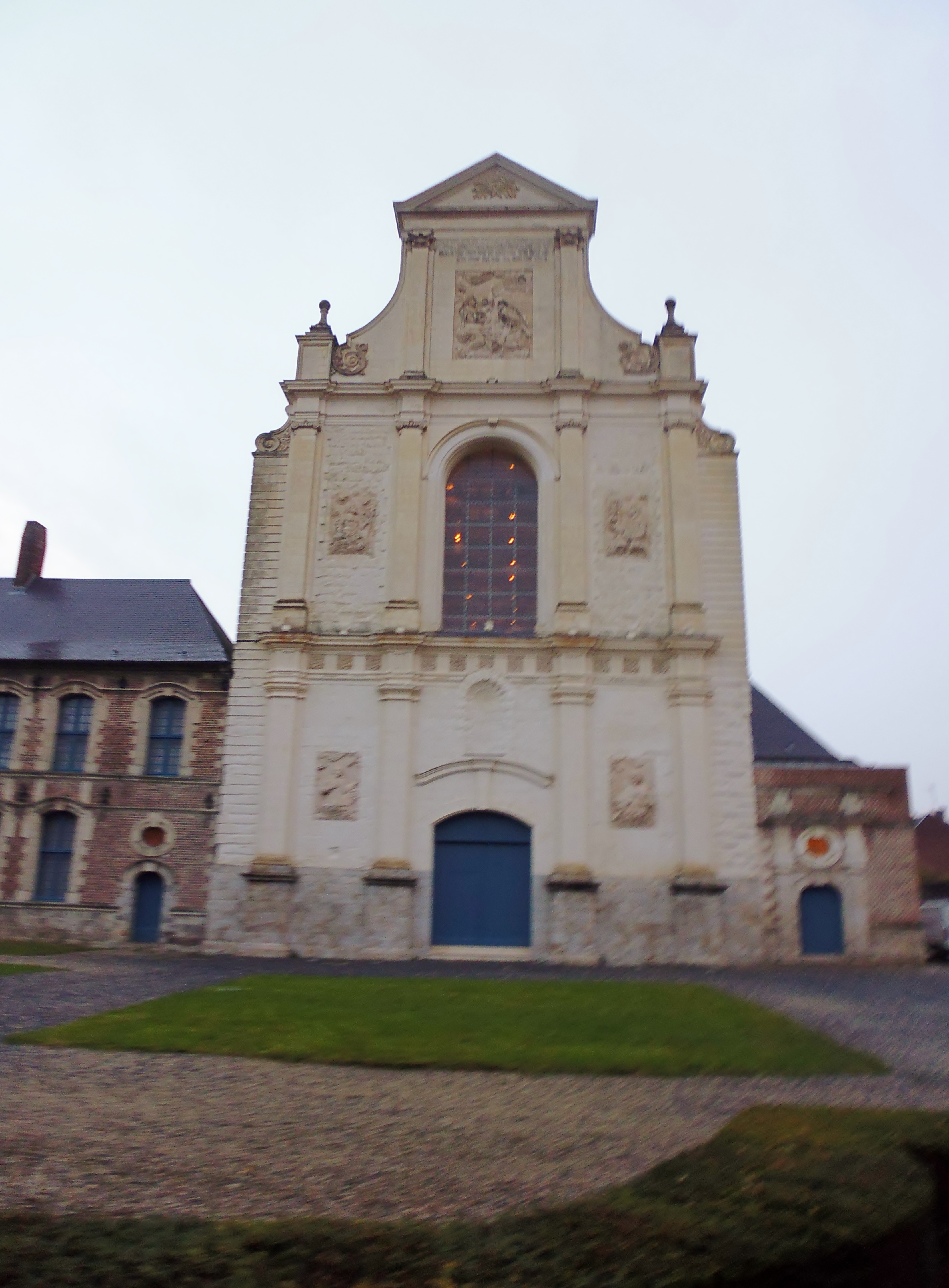 Eglise des Chartreux, Musée de la Chartreuse de Douai